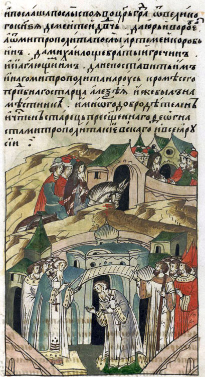 ЛИЦЕВОЙ ЛЕТОПИСНЫЙ СВОД. Отбытие послов в Царьград в 1352 году. Потом, посоветовавшись с сыном своим духовным великим князем Семеном Ивановичем и с братьями его, с князем Иваном Ивановичем и с князем Андреем Ивановичем, с боярами и с вельможами, был его наместником. И еще при своей жизни завещал, чтобы его поставили владыкой, и благословил его после смерти своей на великий стол митрополитом Киевским и всея Руси. 127 послали послов своих в Царьград: от великого князя послы — Дементий Давыдович да Юрий Воробьев, а от митрополита послы — Артемий Коробьин, да грек Михаил о Щебратый. Они должны были просить, чтобы не ставили им никого на Русь в митрополиты, кроме преподобного старца Алексея, который был наместником и был во всем добродетелен и честен, и был он старцем преосвященного Феогноста, митрополита Киевского и всея Руси.